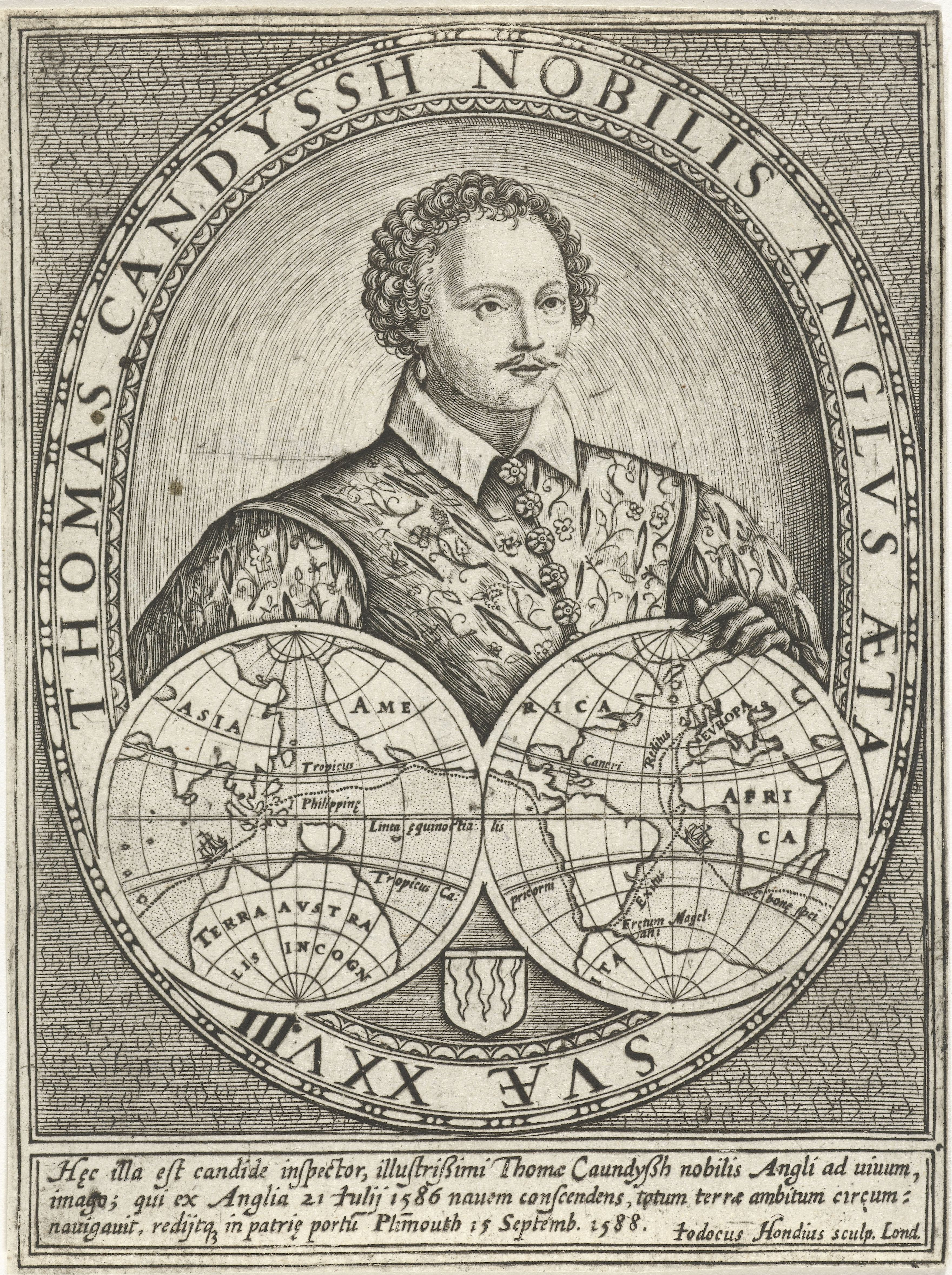 IdentificatieTitel(s): Portret van Thomas CavendishObjecttype: prent Objectnummer: RP-P-1882-A-6507Catalogusreferentie: Hollstein Dutch 1Opschriften / Merken: verzamelaarsmerk, verso, gestempeld: Lugt 2228Omschrijving: Buste van Thomas Cavendish op 28-jarige leeftijd in een ovaal Waar: van het onderste deel door twee wereldronden wordt ingenomen. Met randschrift in het Latijn. Onderaan drie regels in het Latijn.VervaardigingVervaardiger: prentmaker: Jodocus Hondius (I) (vermeld op object)Plaats vervaardiging: LondenDatering: ca. 1595 - 1597Fysieke kenmerken: ets en gravureMateriaal: papier Techniek: graveren (drukprocedé) / etsenAfmetingen: blad: h 107 mm (afgesneden op plaatrand) × b 80 mmToelichtingVolgens Hollstein prent gebruikt in: Jodocus Hondius, Vear Totius Expeditiones Nauticae Descriptio, ca. 1595-1597.OnderwerpWie: Thomas CavendishVerwerving en rechtenVerwerving: aankoop nov-1882Copyright: Publiek domein